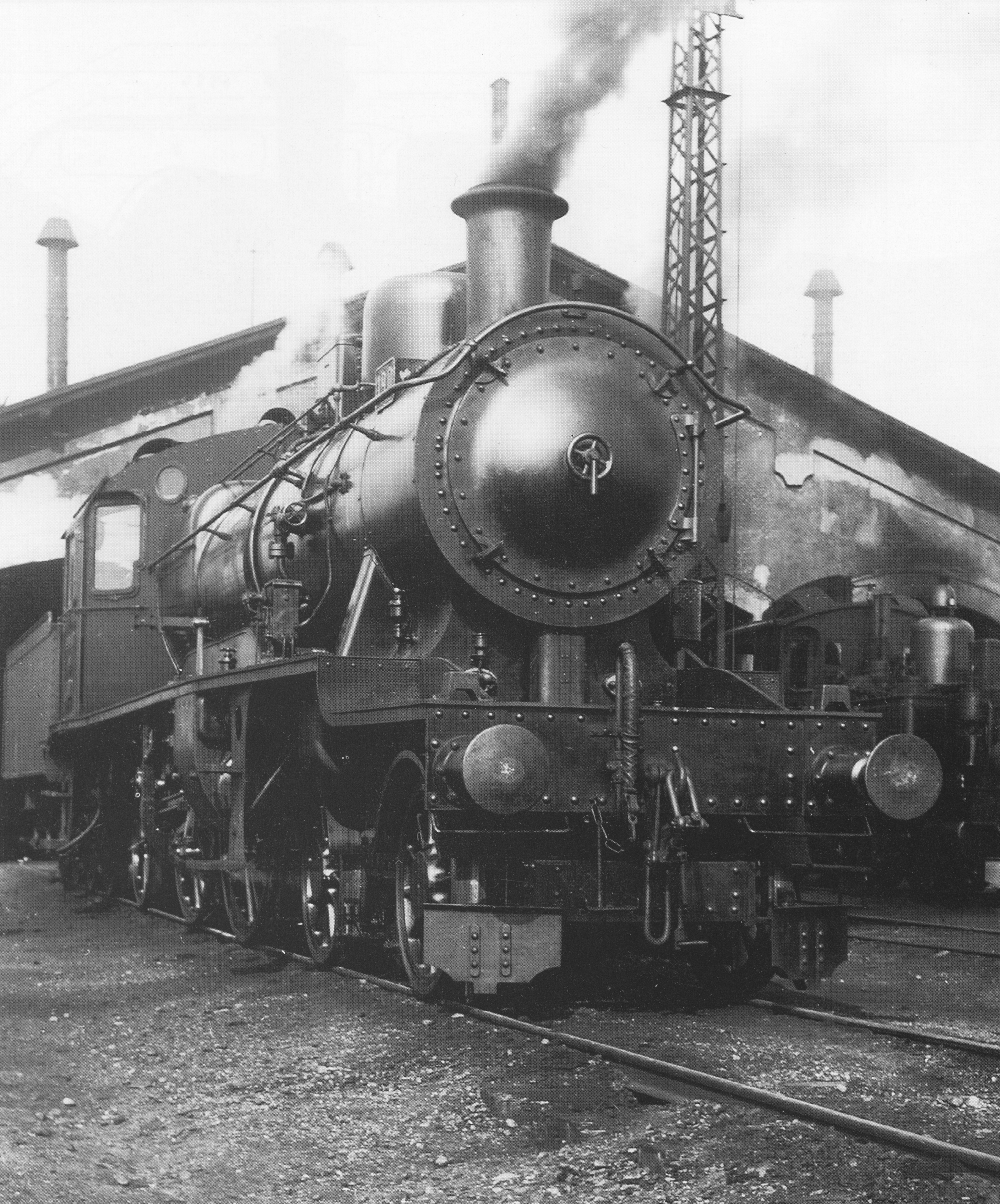 Dampflokomotive Sächsische X V vor dem Heizhaus Dresden-Pieschen.